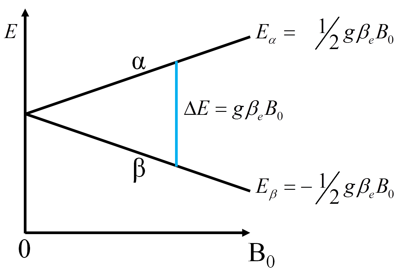 אפקט זימאן האלקטרוני. בהיעדר שדה מגנטי, מצבי הספין α ו-β מנוונים אנרגטית. בנוכחות שדה מגנטי, האנרגיה של כל מצב ספין תלויה במספר הספין שלו: זו של מצב α עולה וזו של מצב β יורדת. פער האנרגיה בין הרמות פרופורציונאלי לגודל השדה.